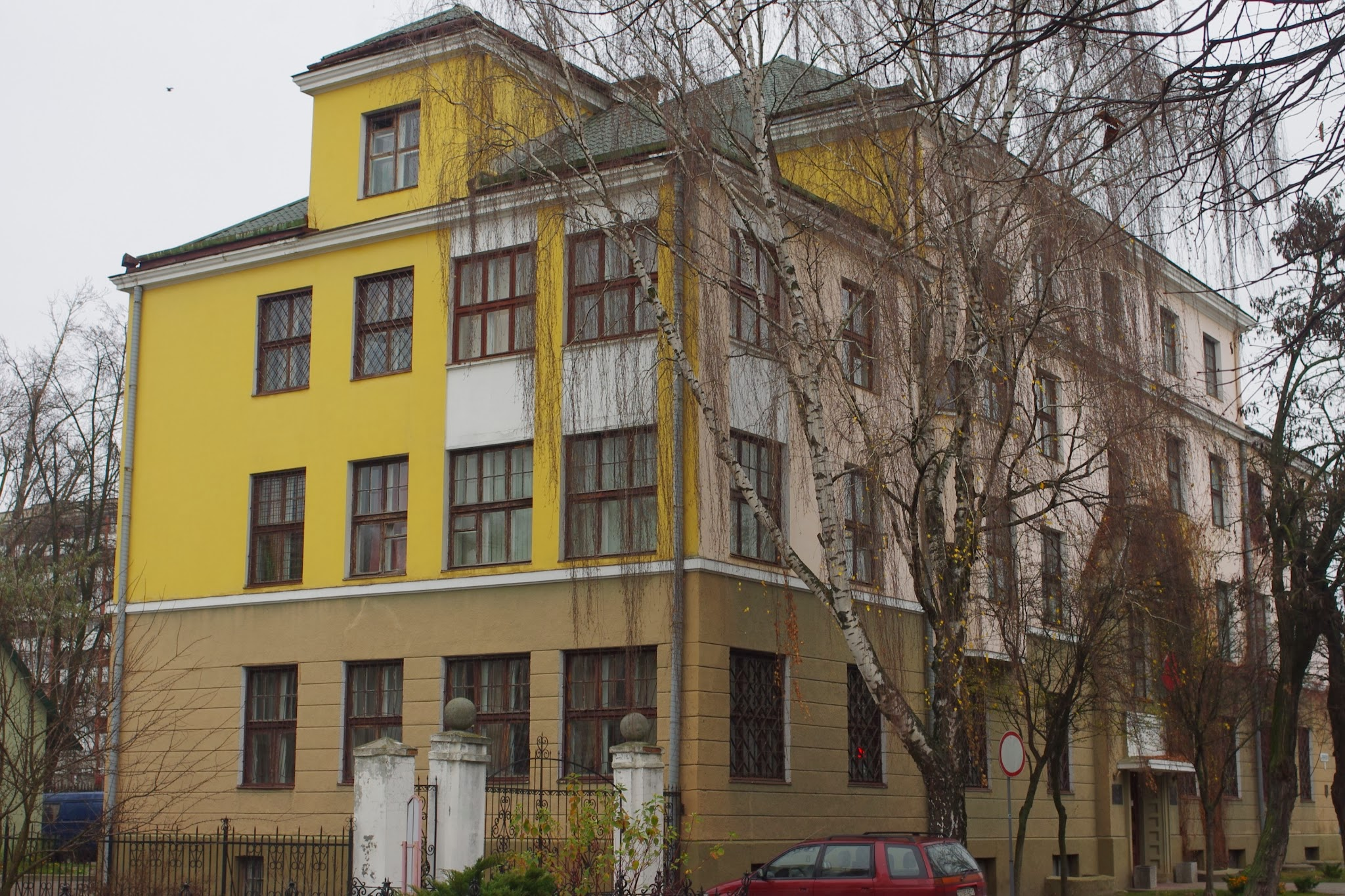 Lieninski rajon, Brest, Belarus